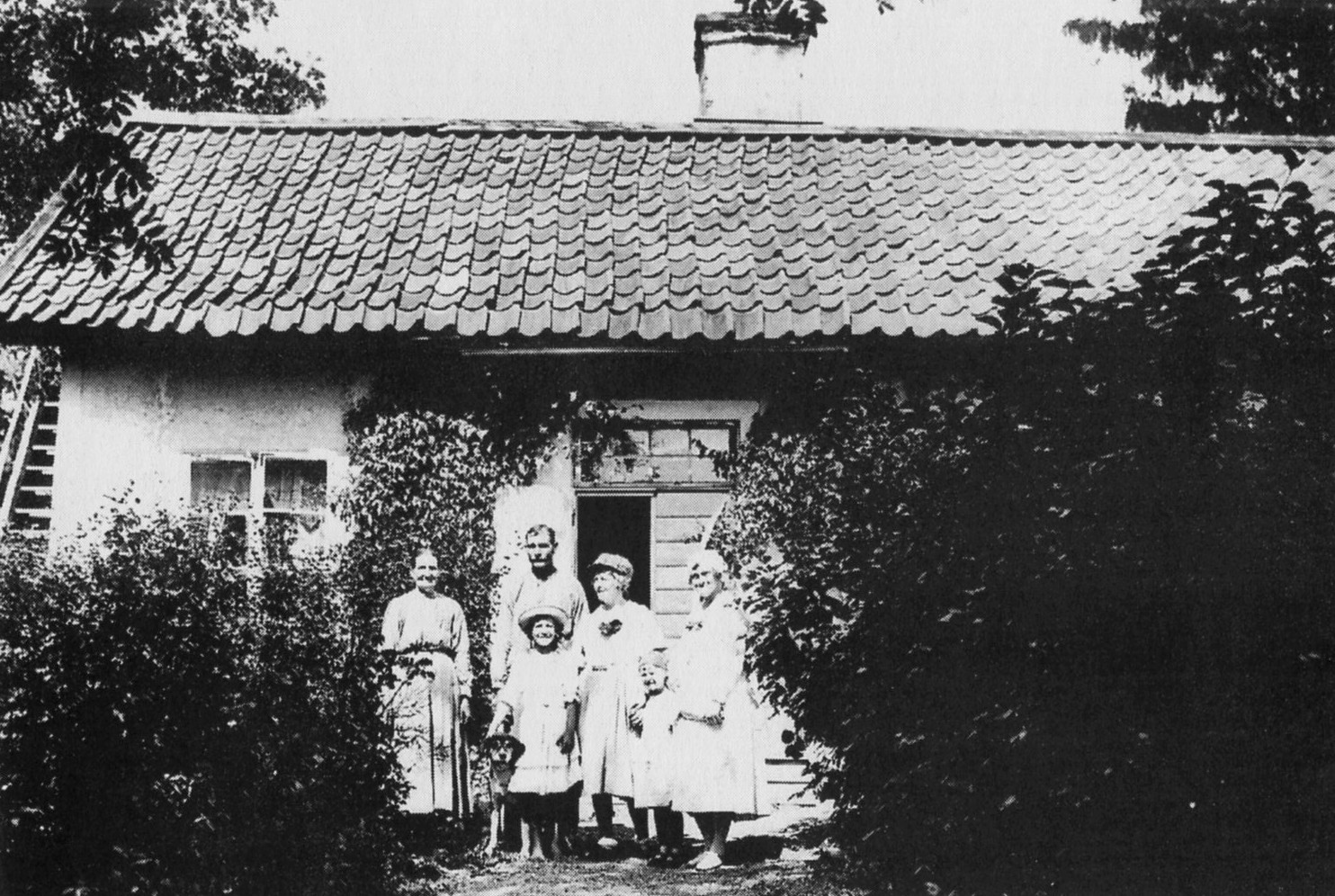 Haga torp i Vårby 1920